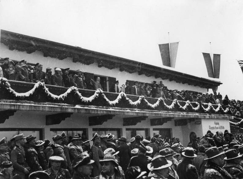 Eröffnung: Der Führer und Reichskanzler Adolf Hitler auf der Tribüne